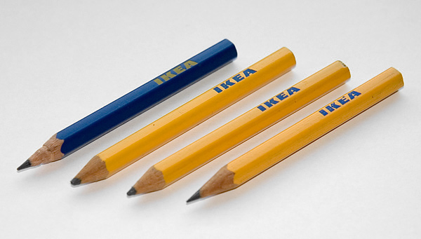 IKEA-Bleistifte